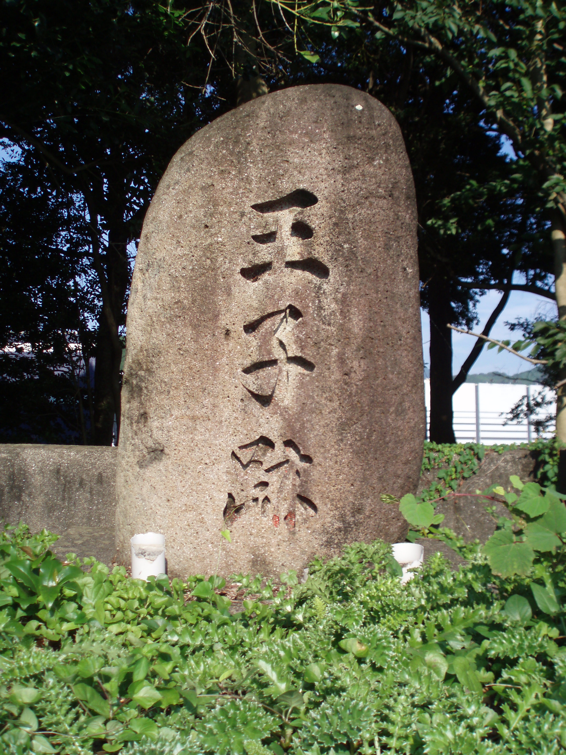 SANO-oji_remains_monument